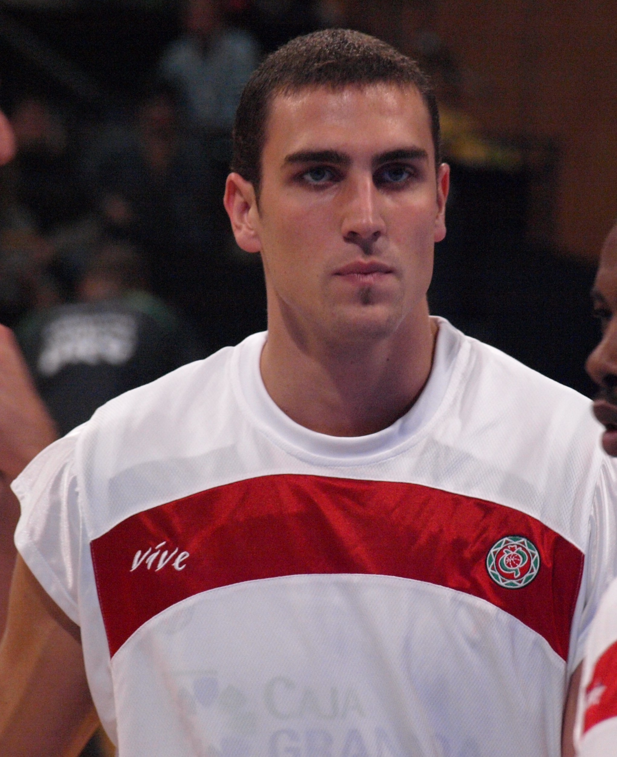 Pablo Aguilar en el partido de primera vuelta de la liga ACB 2008/09 disputado en Olímpico de Badalona ante el DKV Joventut.